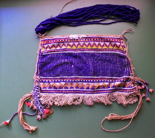 Suppellettile di Tribù indios